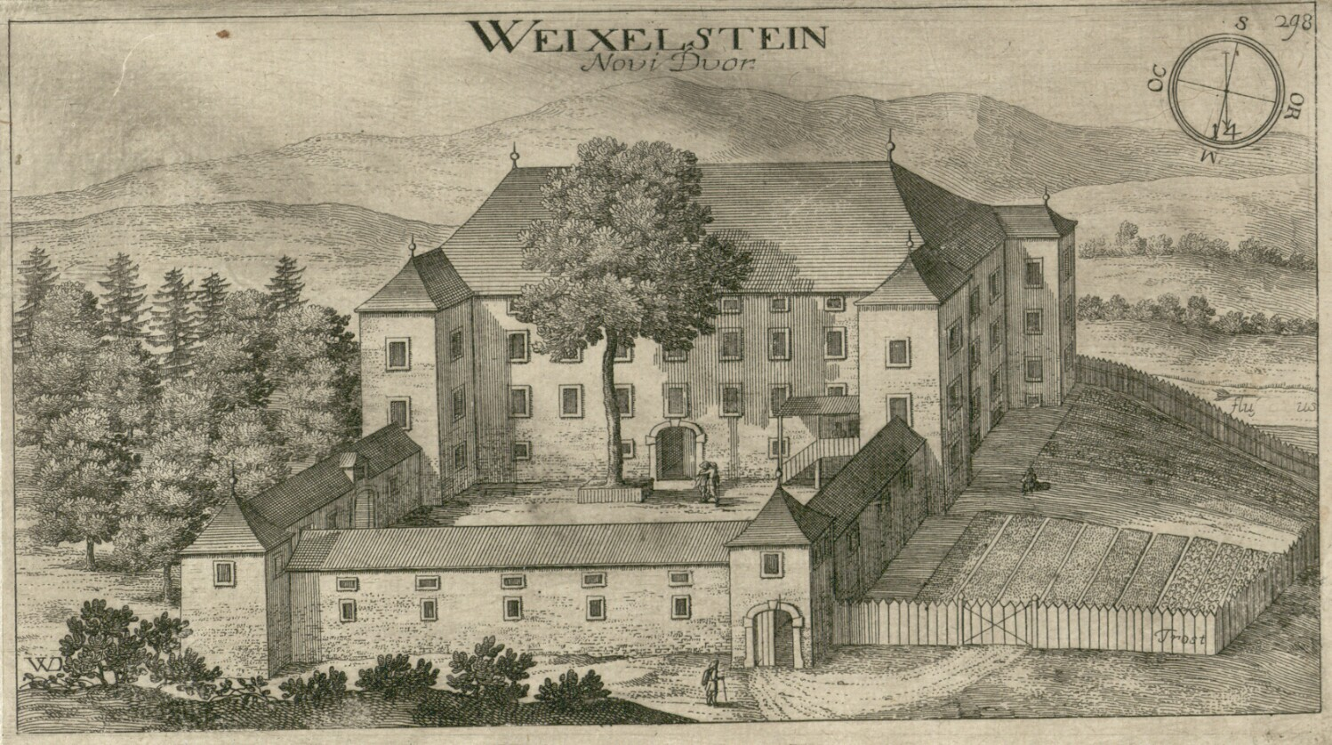 Novi dvor